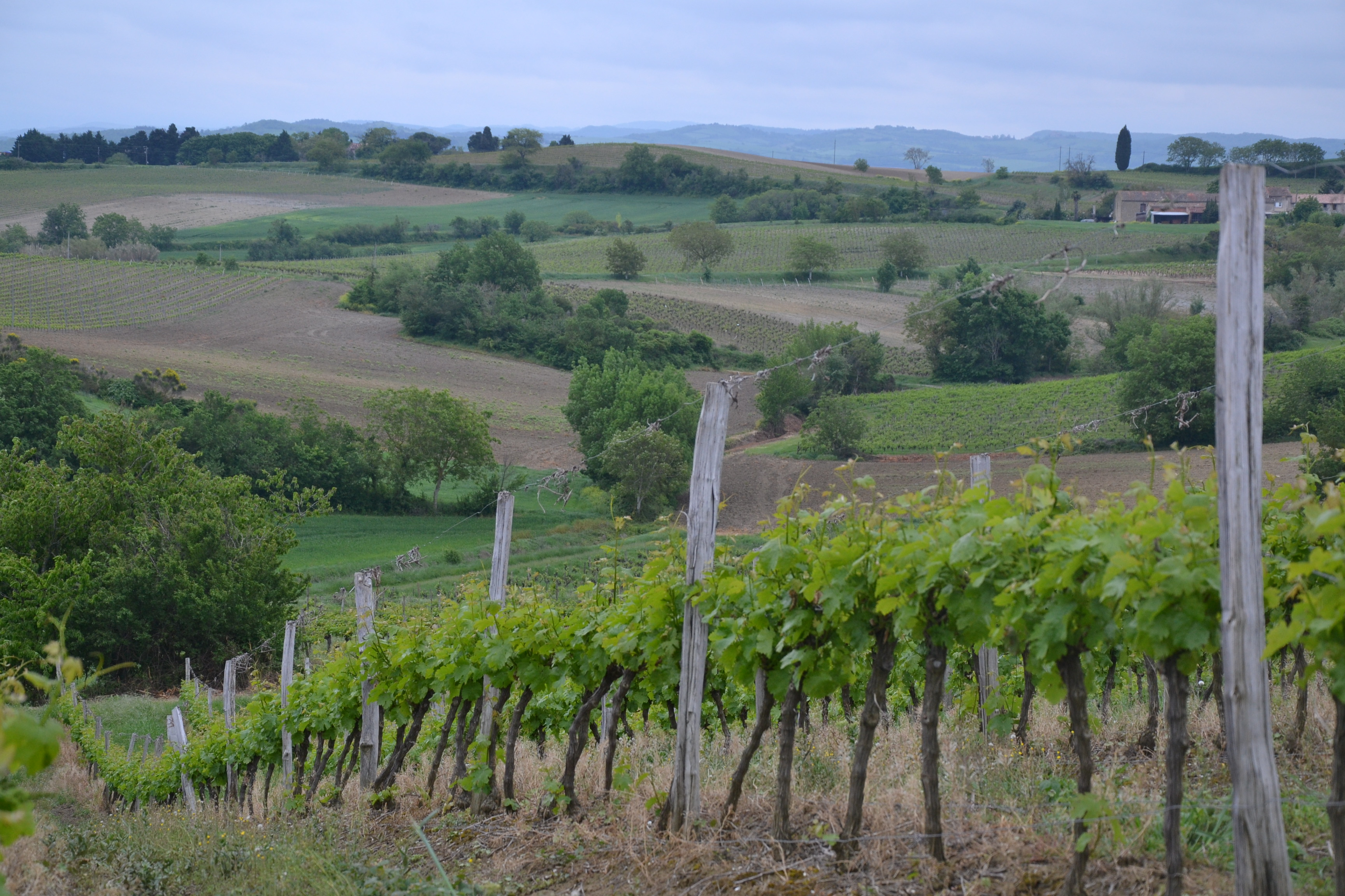 Vignes entre Lasserre-de-Prouille et Brézilhac (Aude, France).